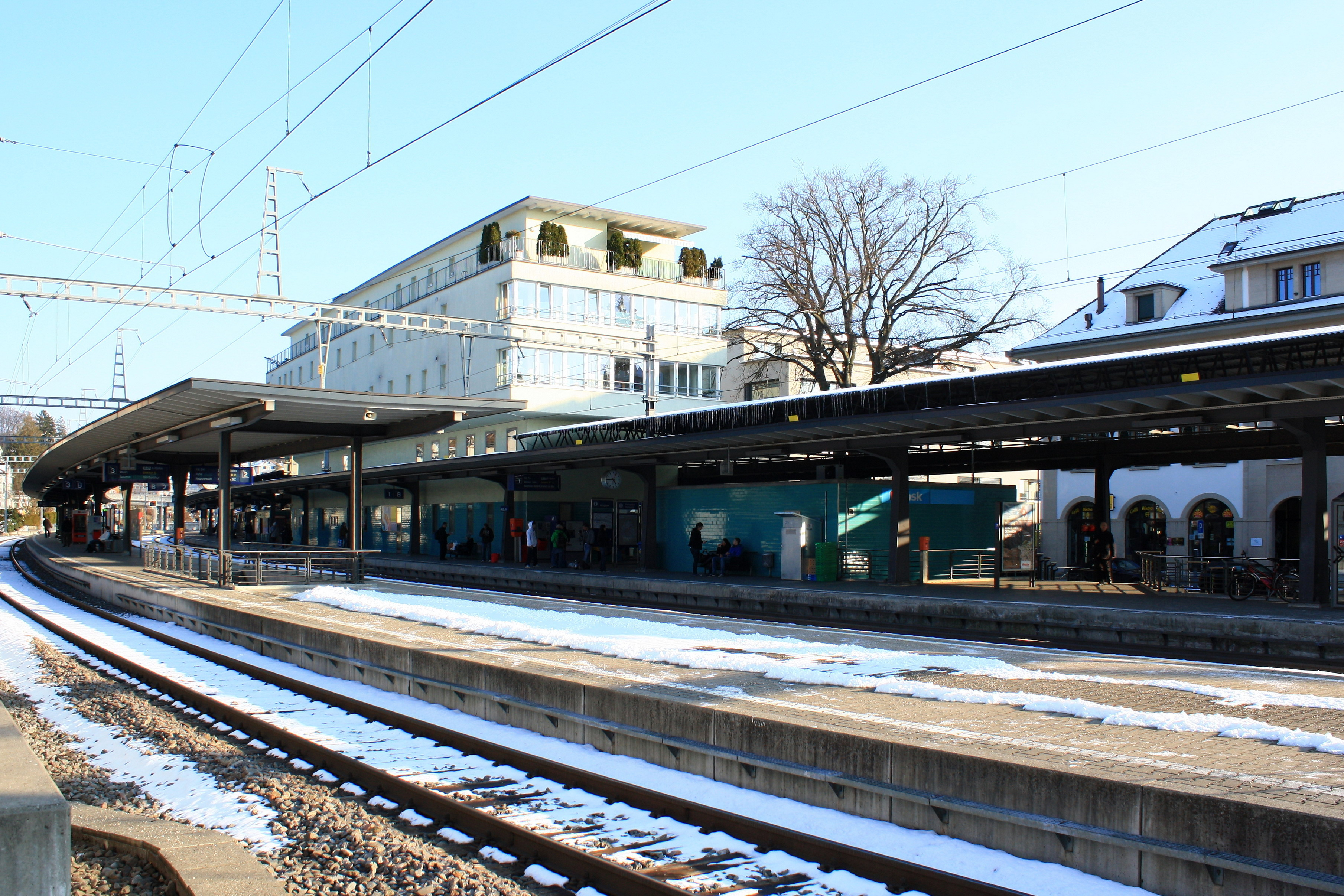 Train station Rüti (ZH) in Switzerland